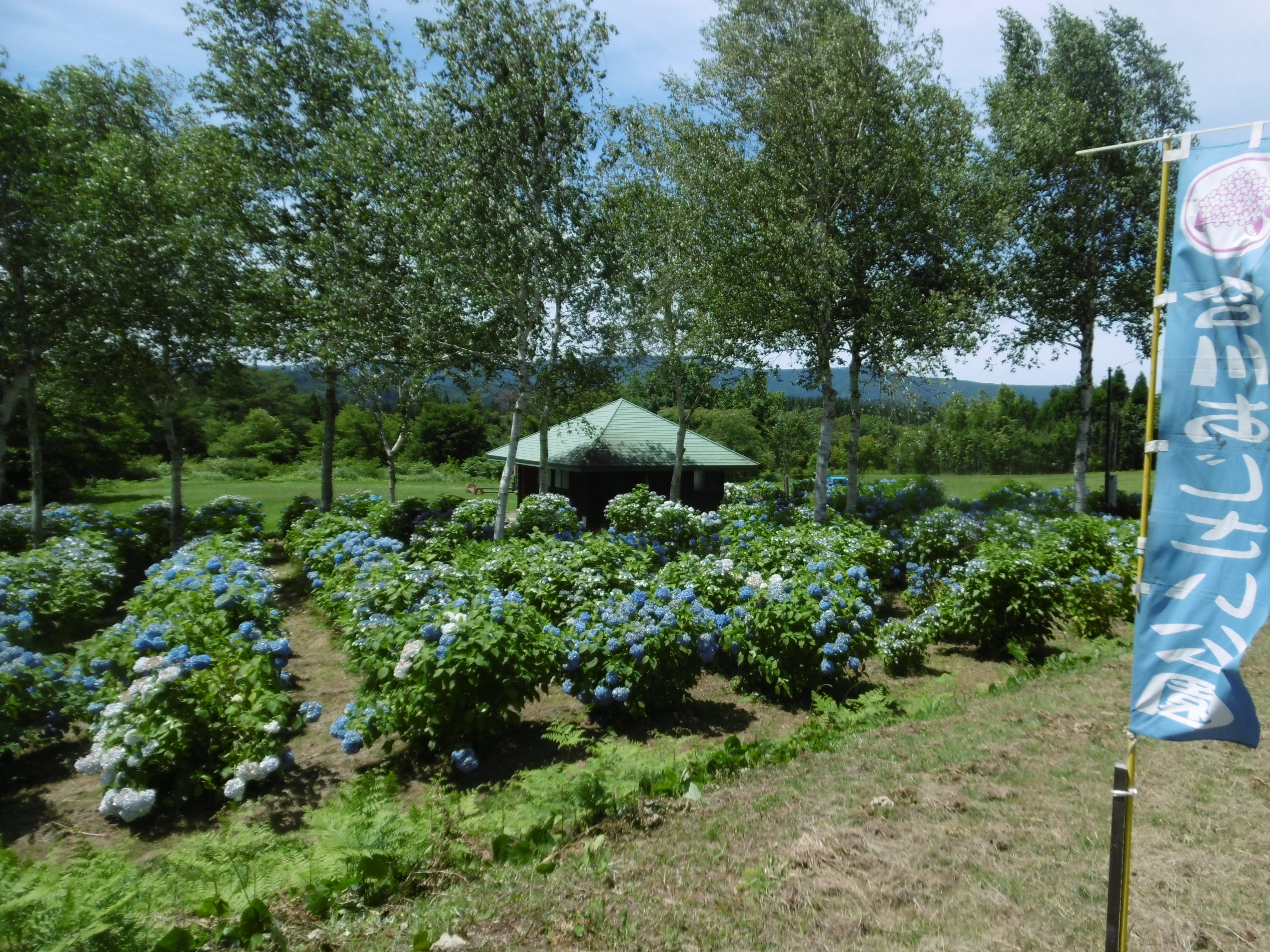 合川翠雲（すいうん）公園のあじさい